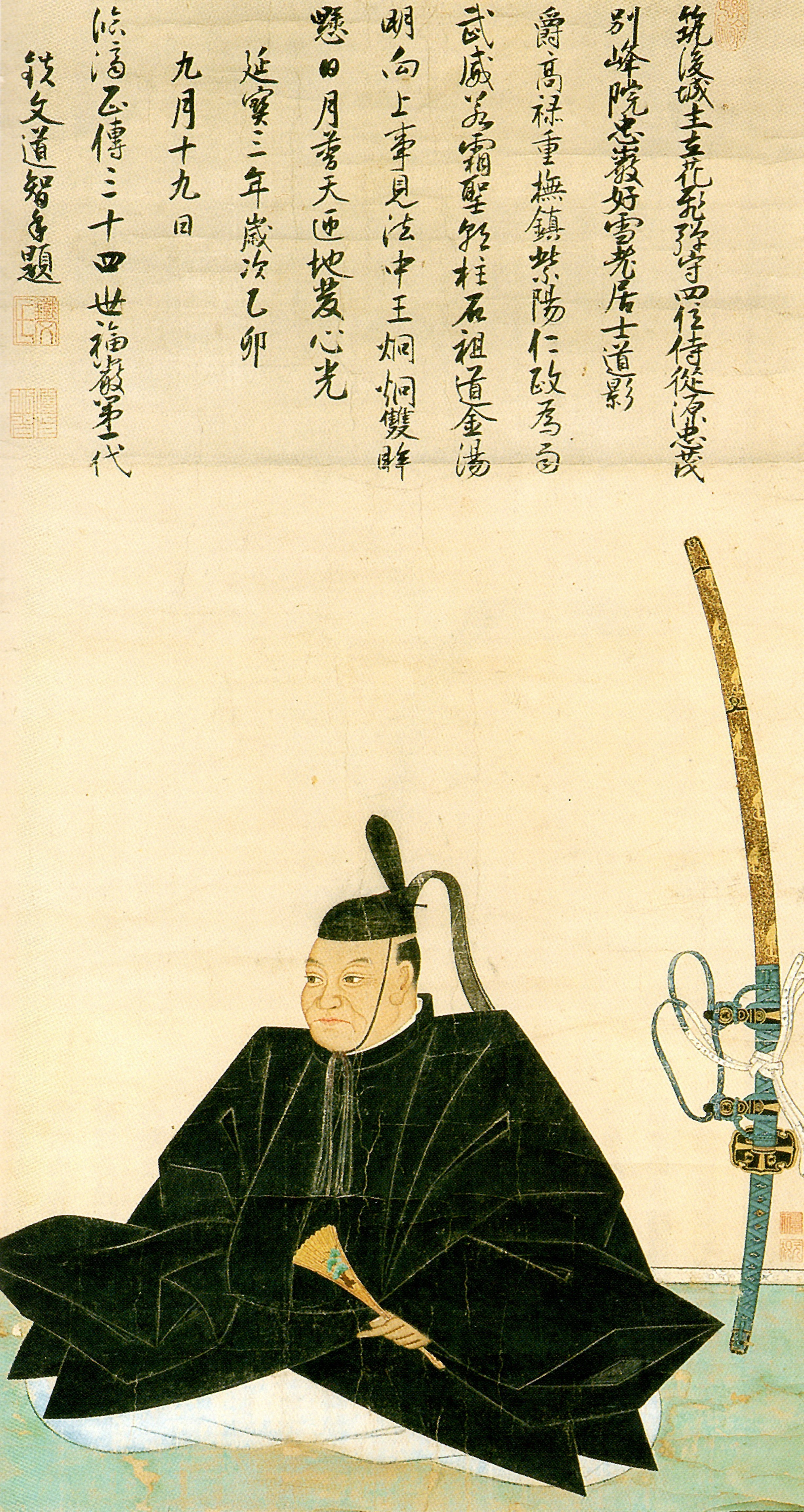 立花忠茂の肖像。